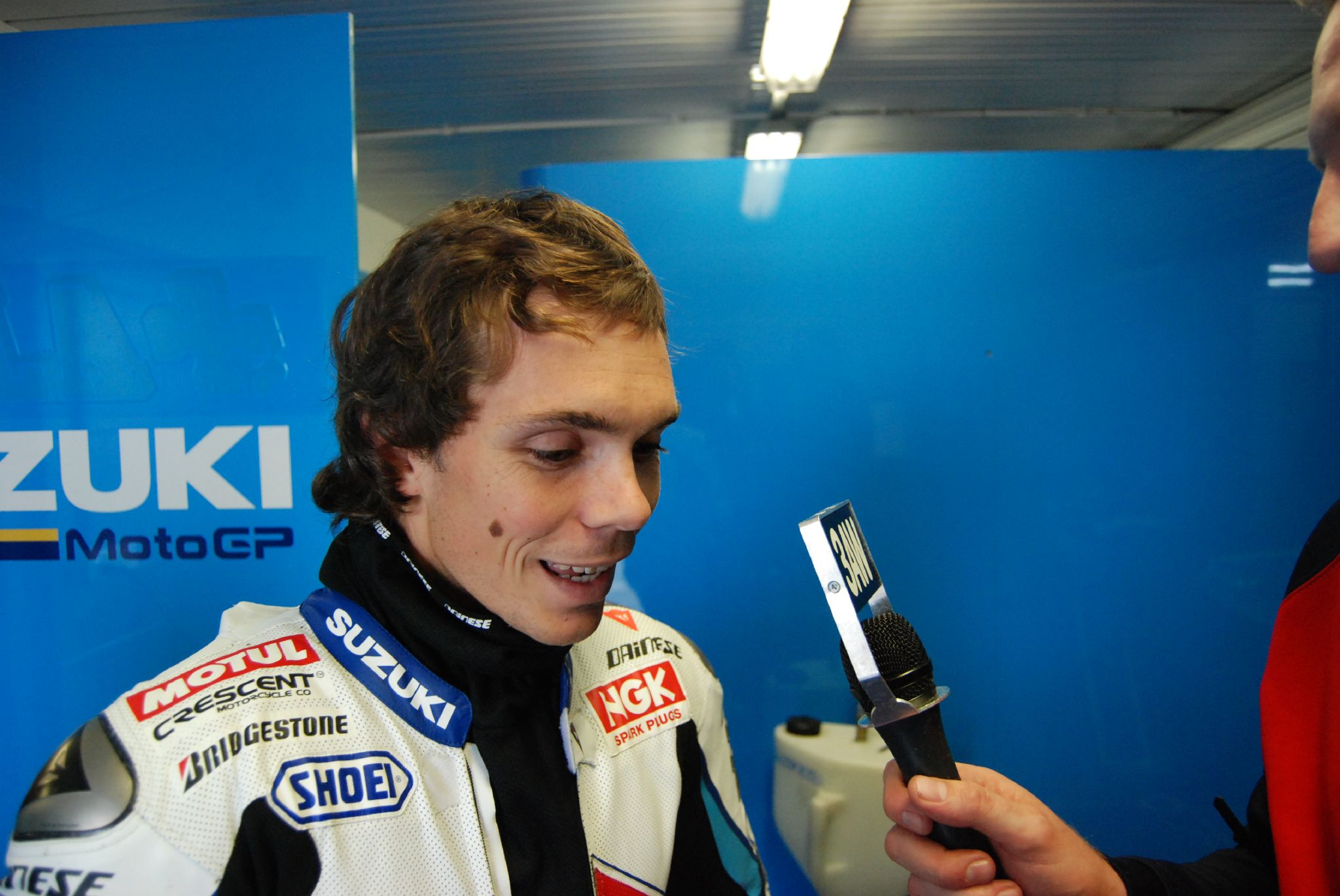 Interviewing Chris Vermuelen.